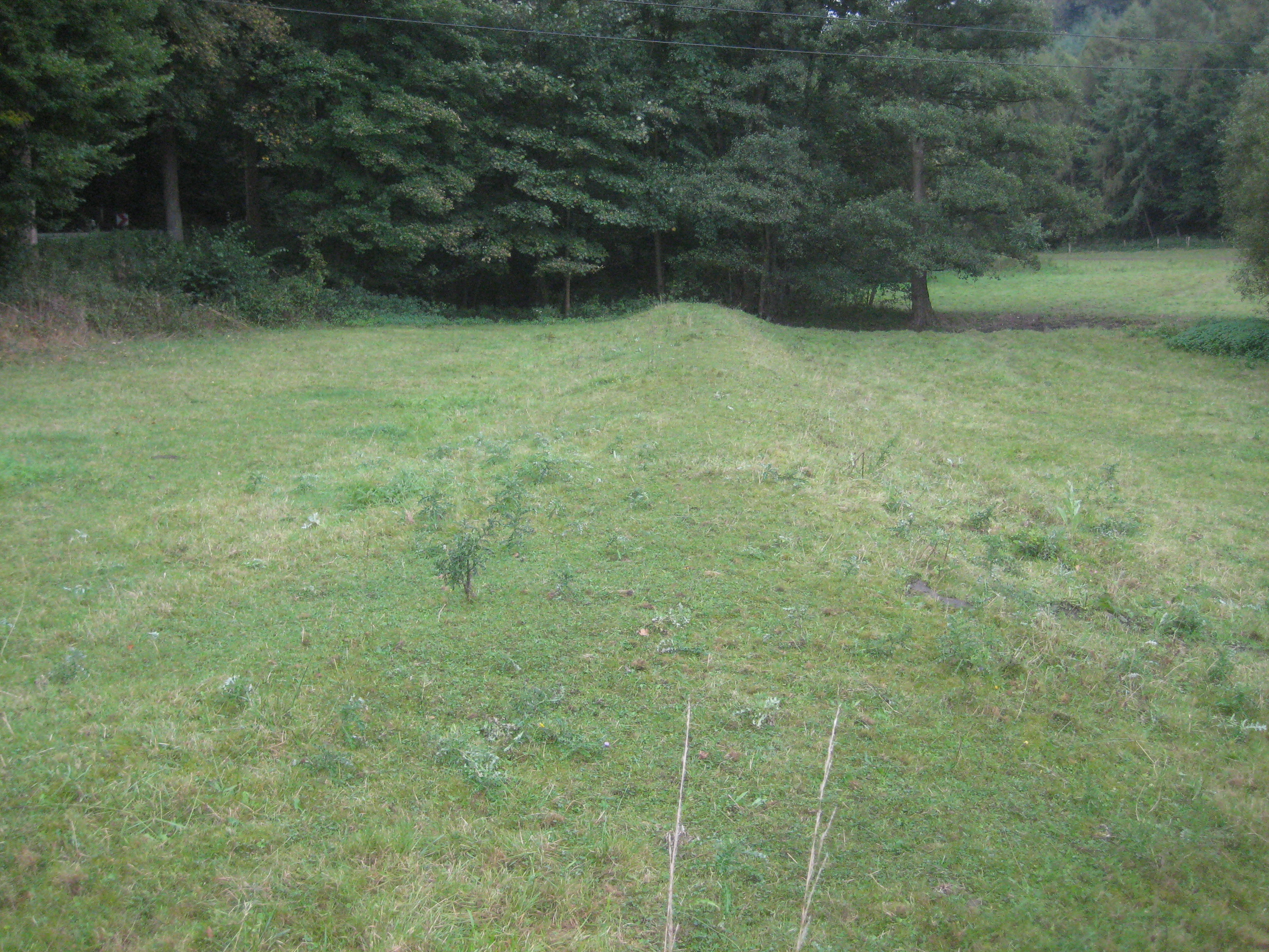 Die Trasse der Schleppbahn an der Bläufabrik 2009